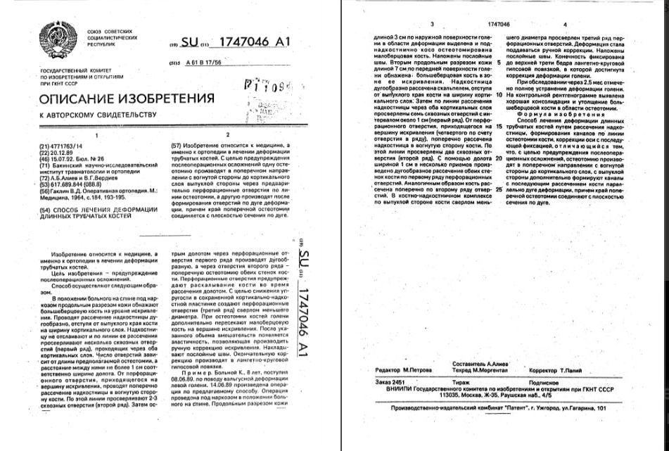 Алифага Алиев Патент Изобретения